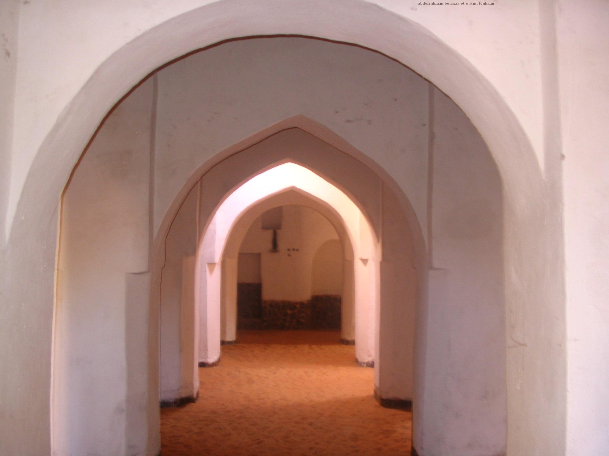 مسجد القصر القديم لمدينة بني عباس.